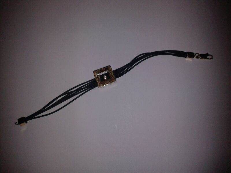 Són braçalets propis per a una entrada en Viquipèdia